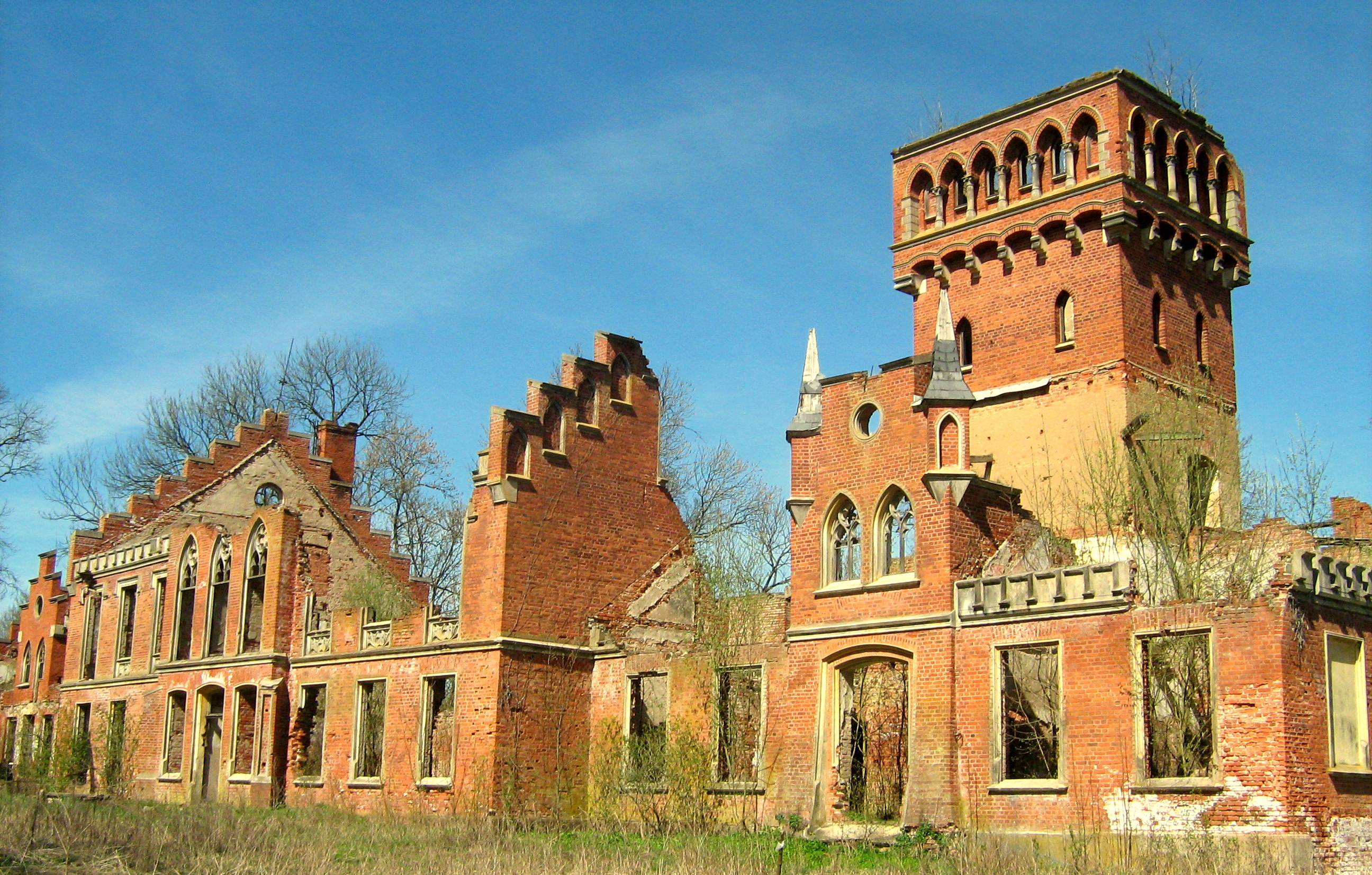 Pałac w Prosnie